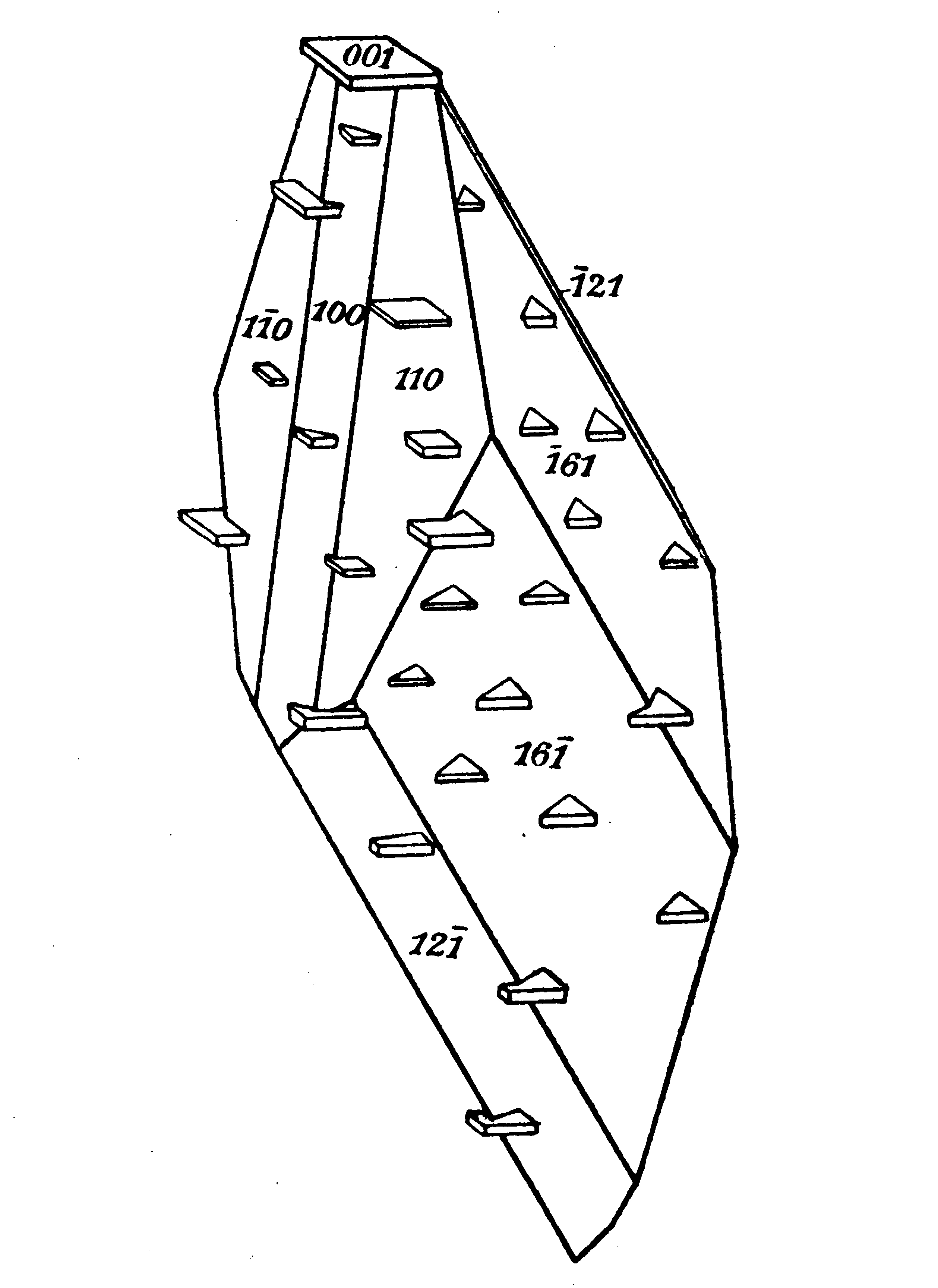 Epitaxie von kleinen tafeligen Barytkristallen auf Barytocalcit